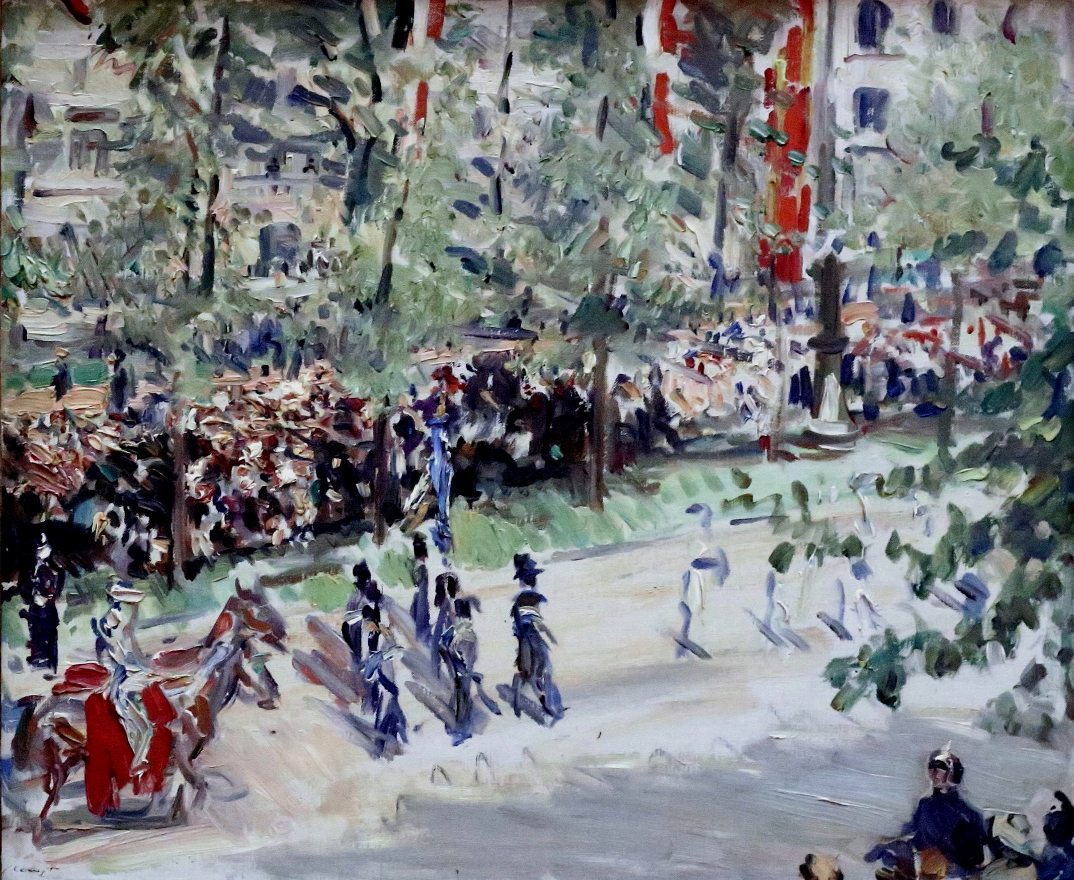 Parade